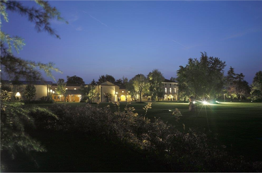 Vista serale Villa Borromeo Padova dal parco